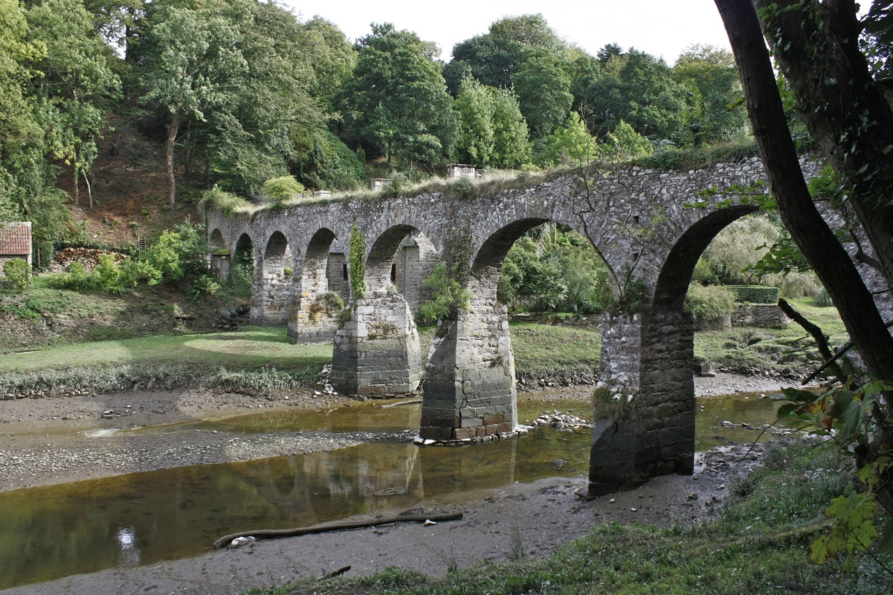 L'aqueduc sur la (ou le) Guindy, inscrit en 1931 .